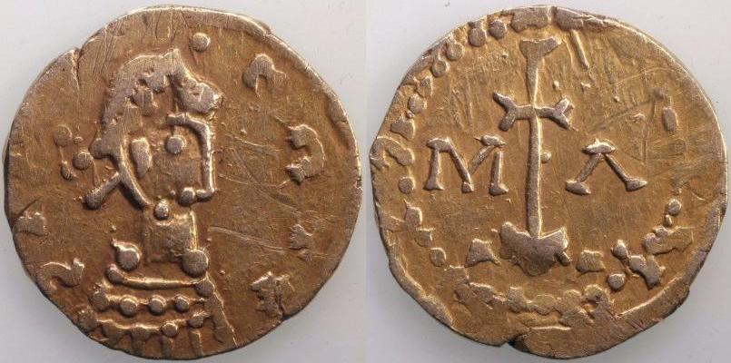 Solidus de Sigebert III frappé à Marseille (639-656). BNF, monnaies, médailles et antiques. Avers : Buste diadémé à droite. Revers : Croix sur un degré accostée de M-A.